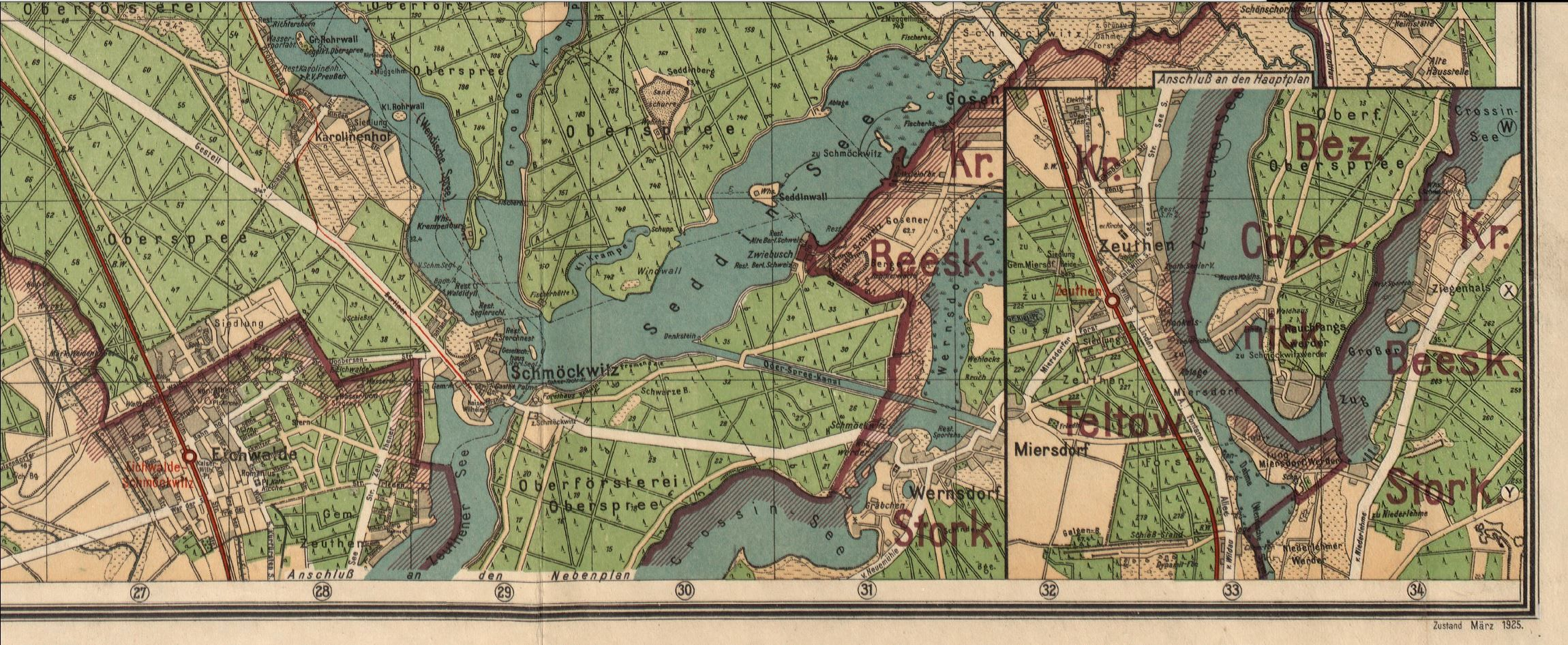 Ausschnitt aus Silva-Übersichtsplan von der Stadt Berlin und ihren 20 Verwaltungsbezirken : auf Grund des Gesetzes vom 27. April 1920 / bearb. und hrsg. von Willy Holz Format: ca 163 x 117 cm Orientierung: Nord Maßstab: 1: 30 000 (Innenstadt 1: 20 000) 2 Blätter, mehrfarbig